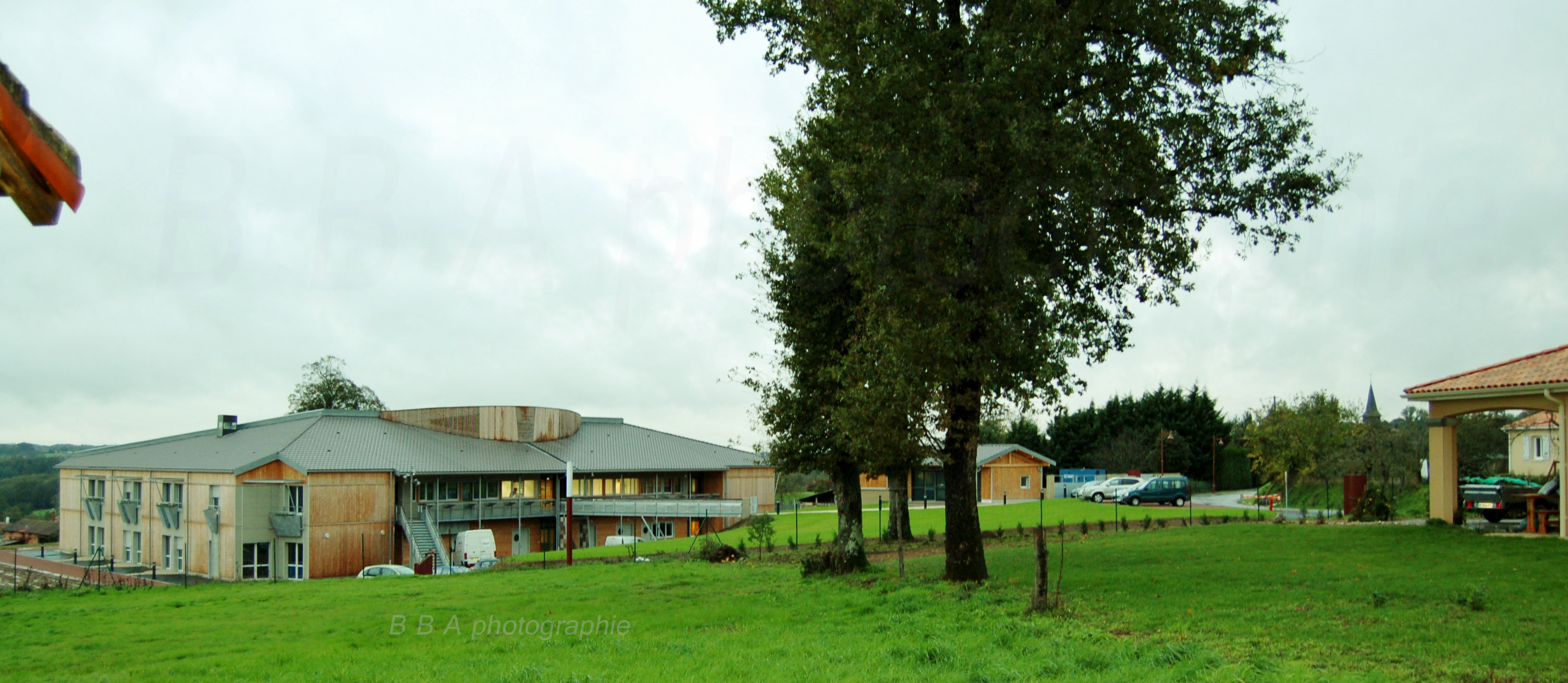 EHPAD La Chalotine, maison de retraite, Brillac, France